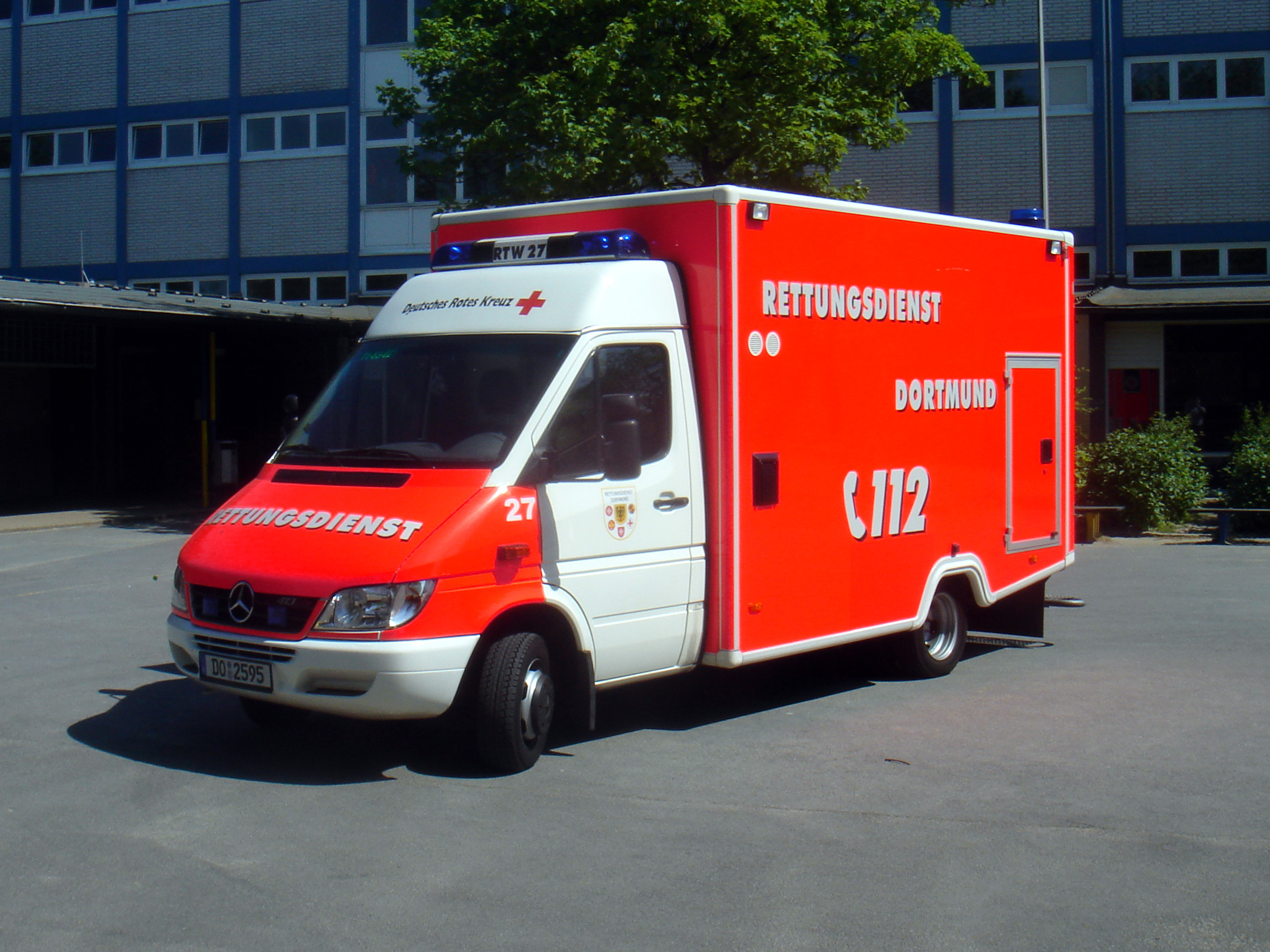 Rettungswagen der aktuellen Generation (Stand 2007) im Rettungsdienst der Stadt Dortmund